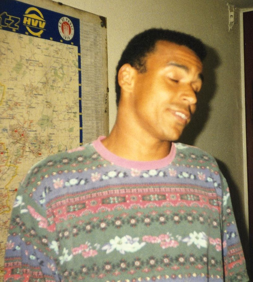 Leonardo Manzi